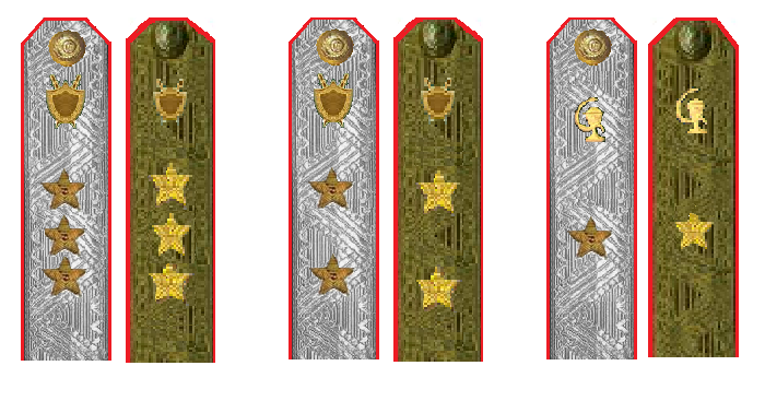 gjujys utythfkjd 1943